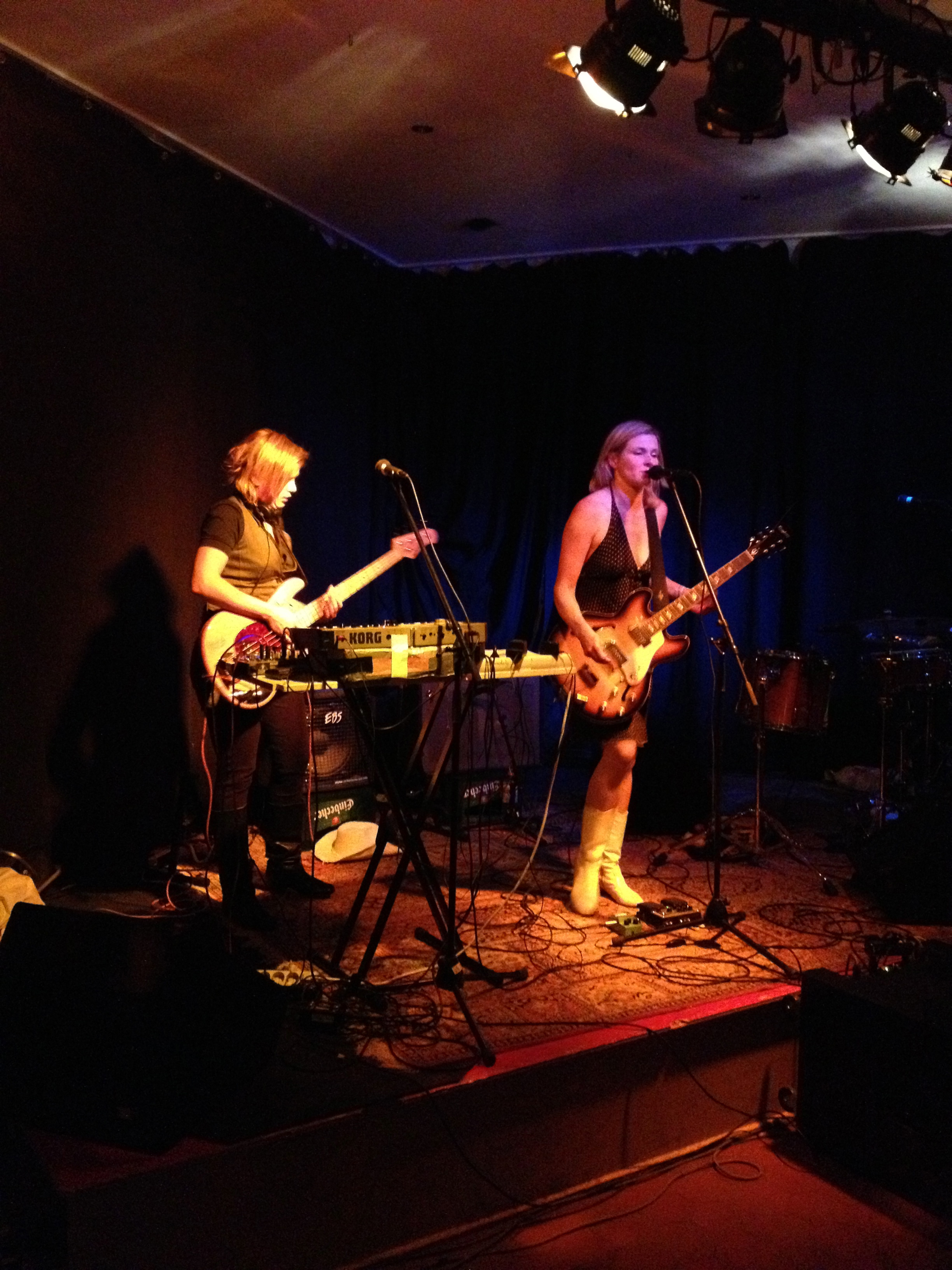 Bernadette La Hengst und Drummerin/Bassistin Wanja